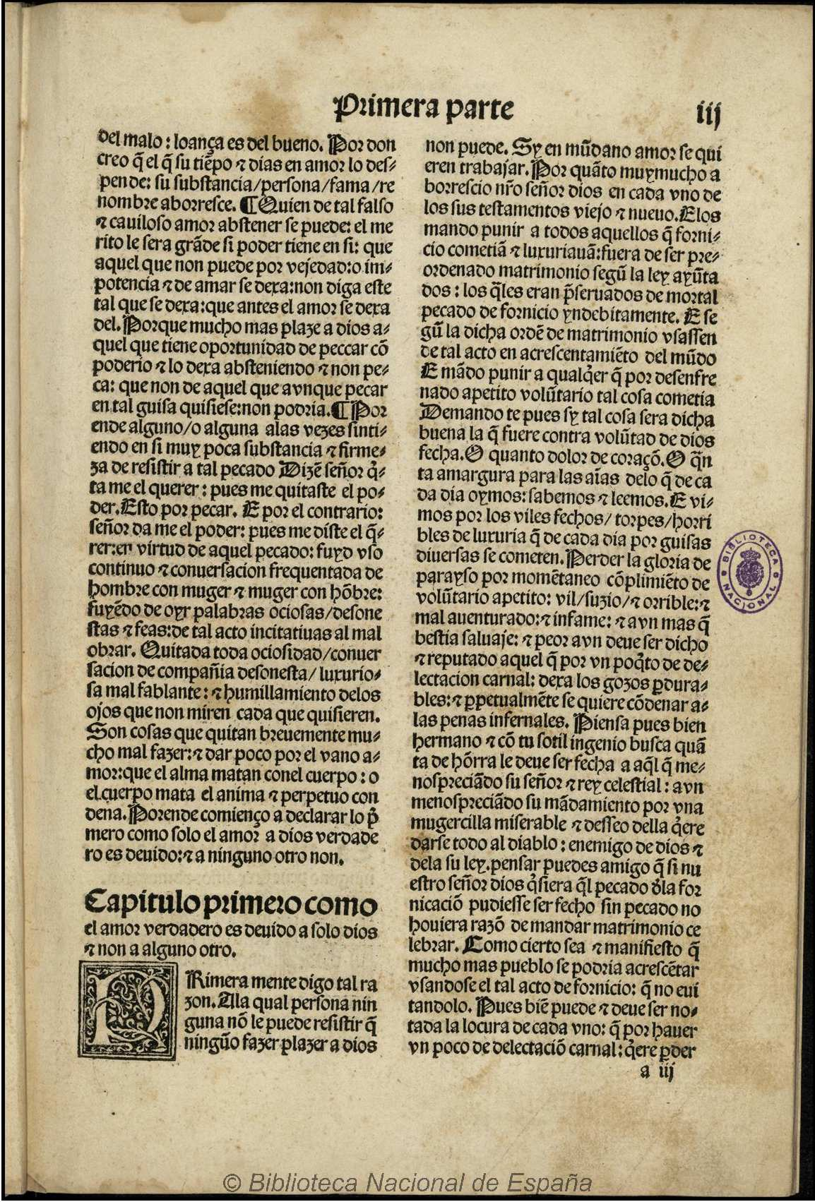 El Corbacho o Reprobación del amor mundano Autor: Martínez de Toledo, Alfonso, Arcipreste de Talavera Fecha: 1498 Datos de edición: Impresso en Sevilla por Meynardo Ungut Aleman y Stanislao Polono compañeros